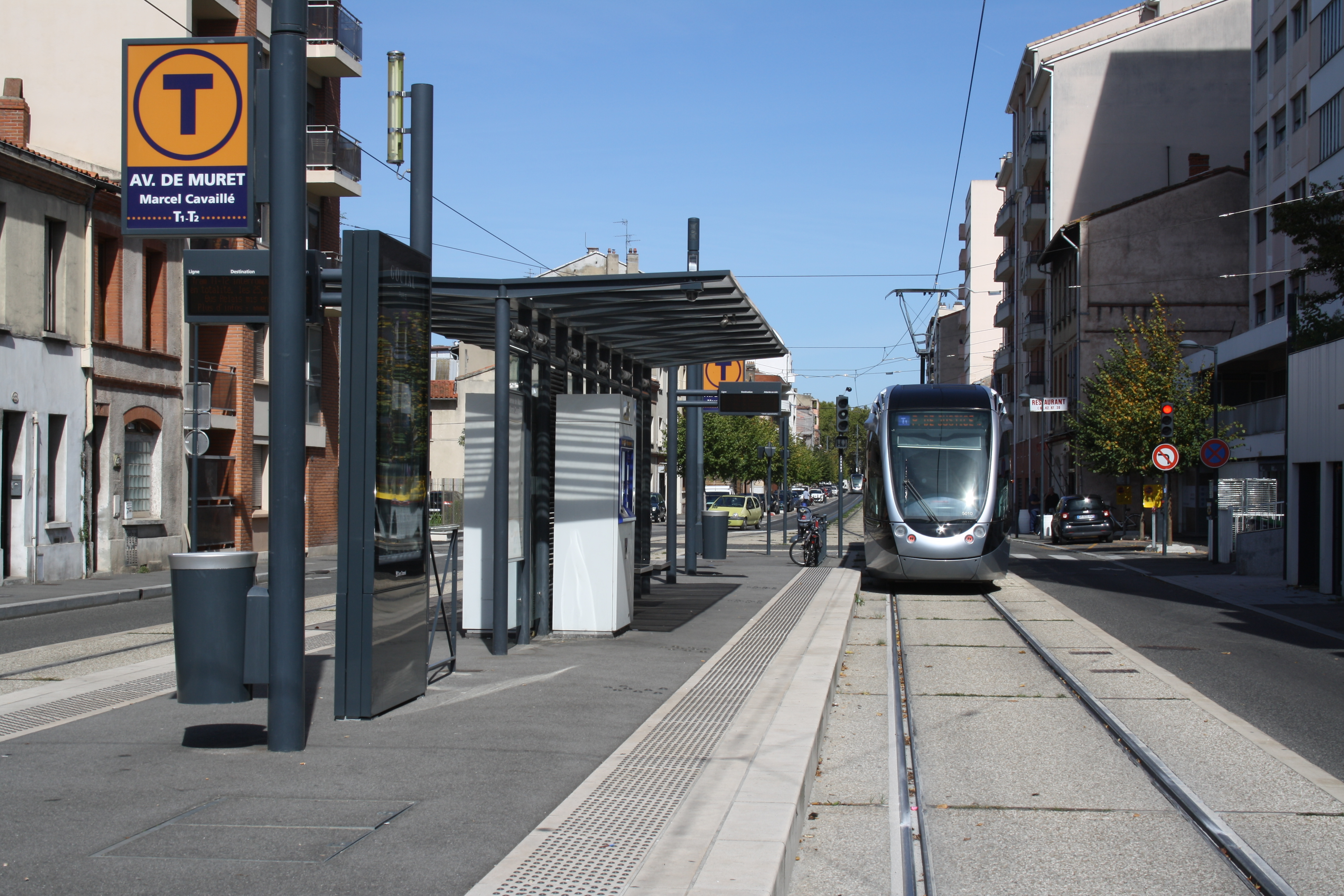 Straßenbahn Toulouse, Station Avenue de Muret Marcel Cavaillé